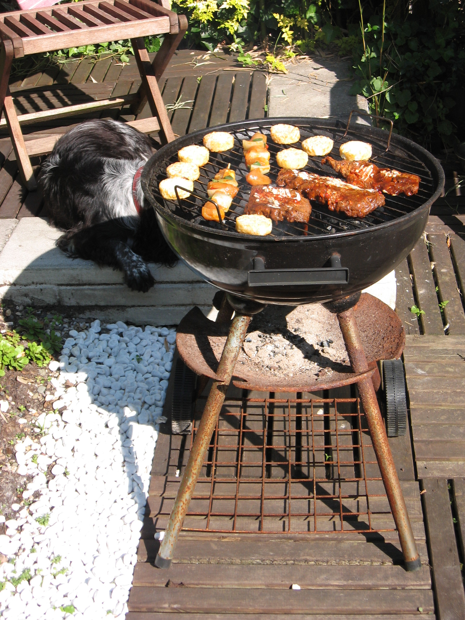 Houtskoolbarbecue